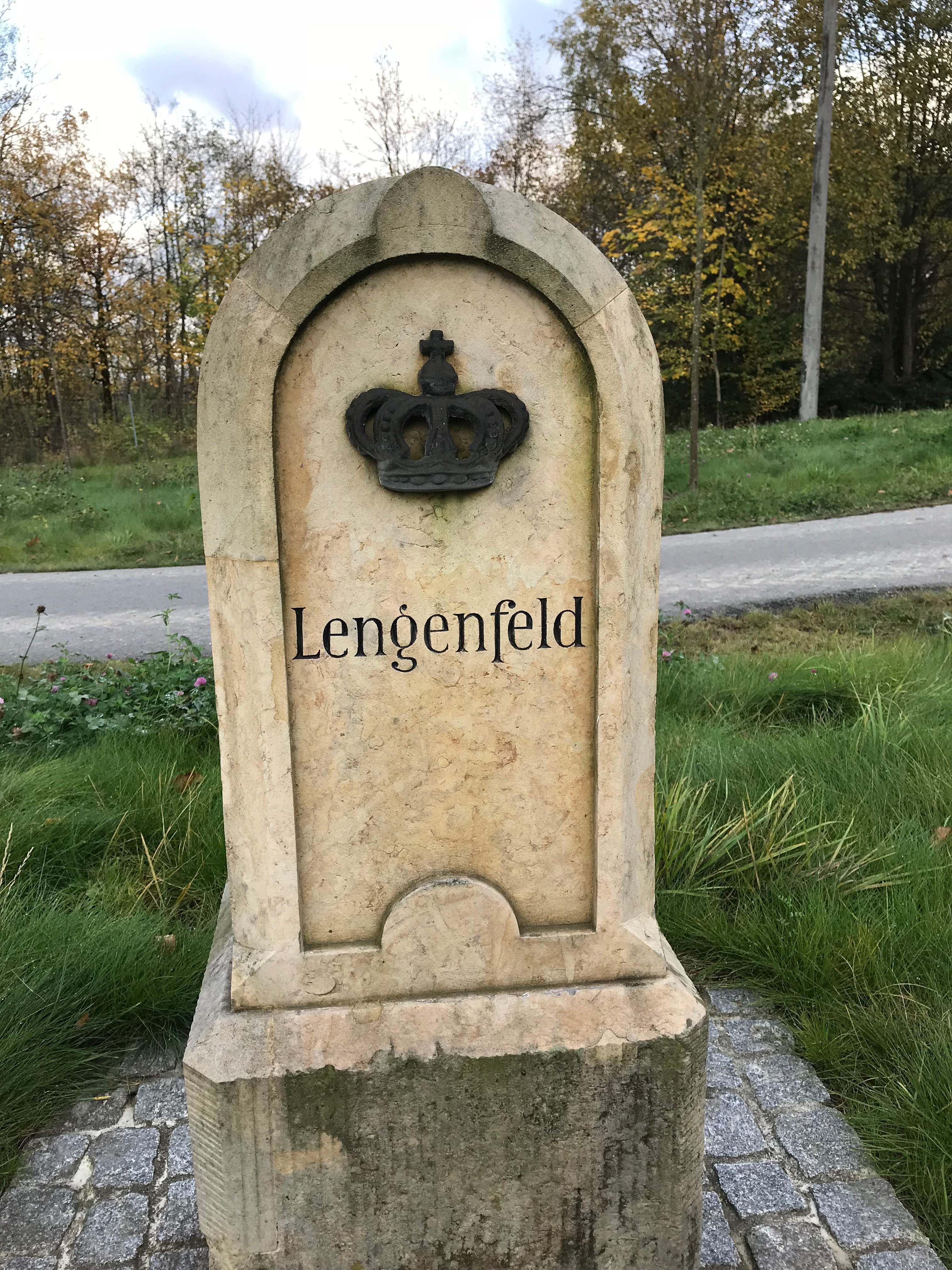 Wegestein an der Eicher Spange, Abzweig Lengenfeld